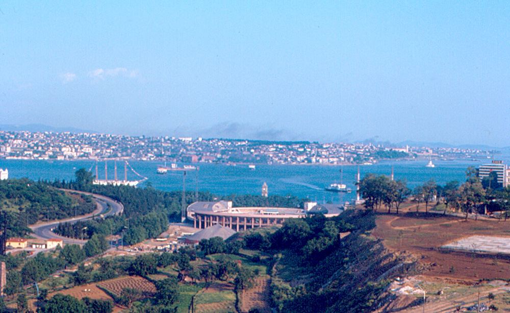 1967'de İnönü Stadyumu ve çevresi. Boğazın karşısında ise Üsküdar arabalı vapur iskelesi görünüyor